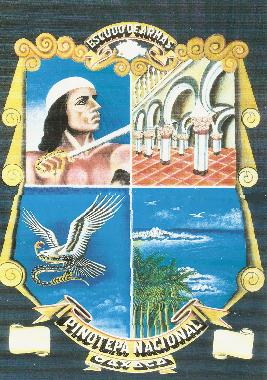 Escudo Nacional de Oaxaca